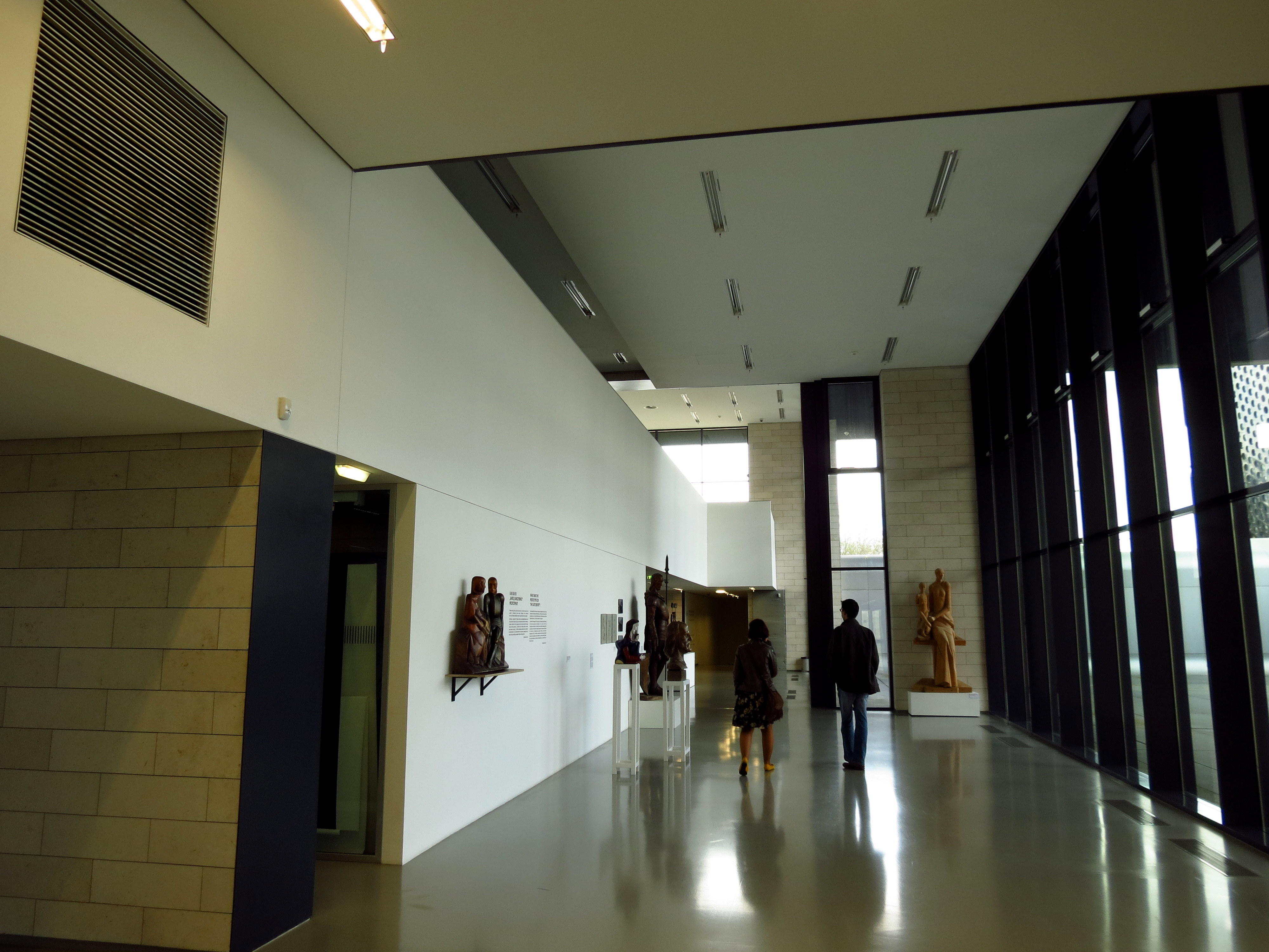 Vue de Vilnius.